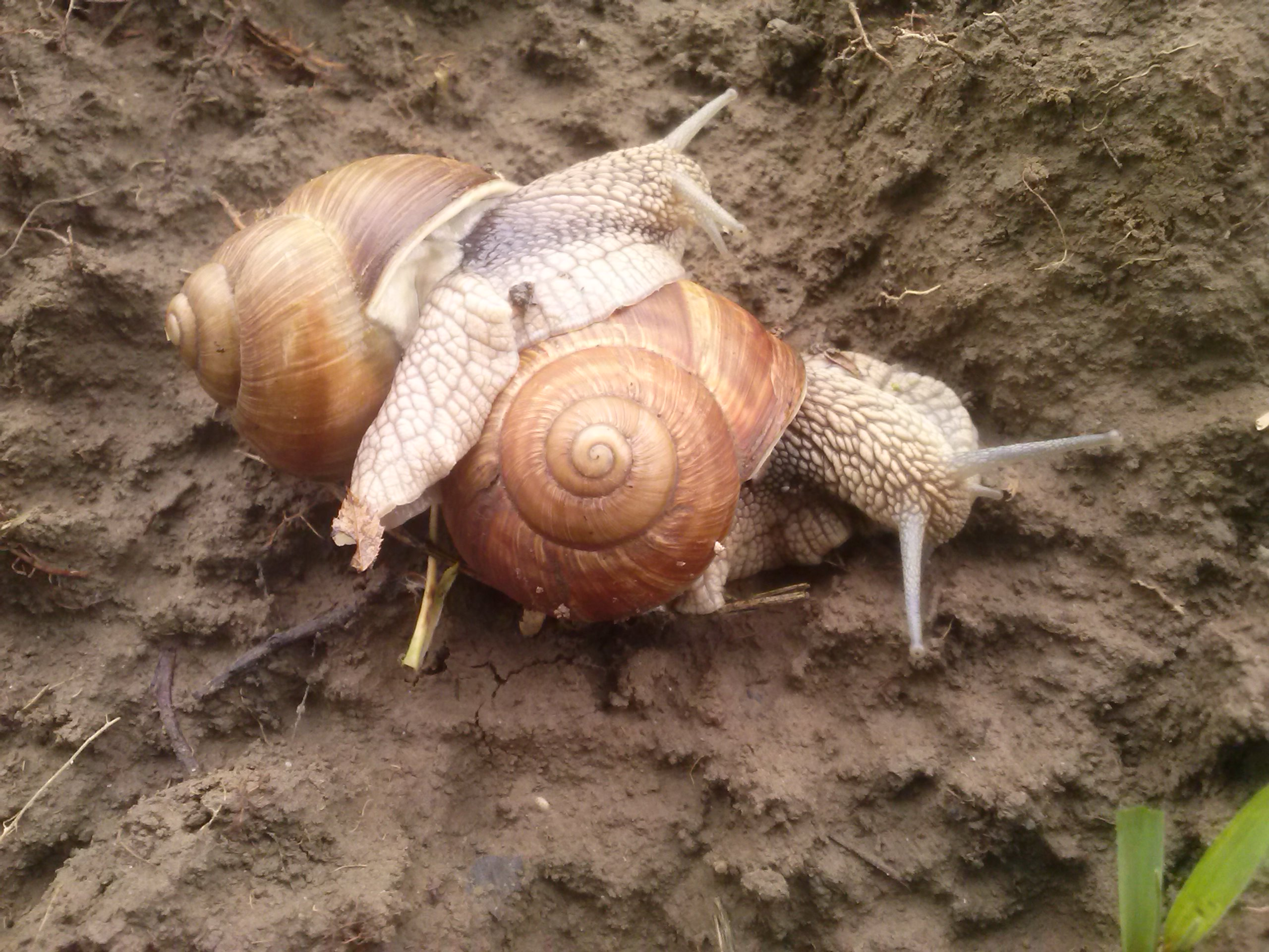 Kopulacja ślimaków winniczków